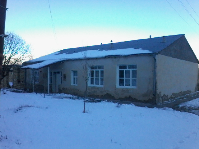 Արցախի Շահումյանի շրջանի Նոր Մանաշիդ գյուղի դպրոց